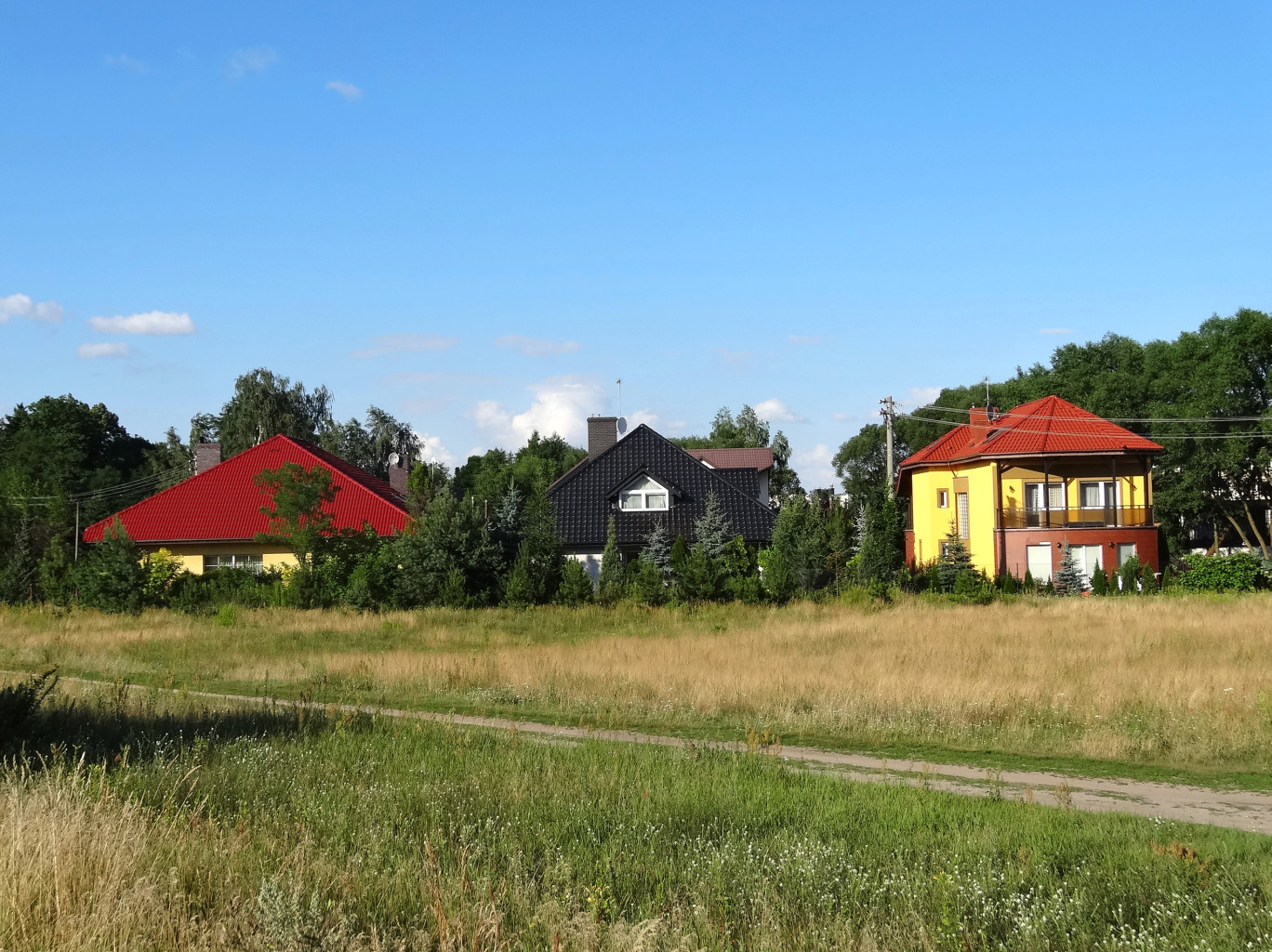 Zabudowa na osiedlu Prądy w Bydgoszczy